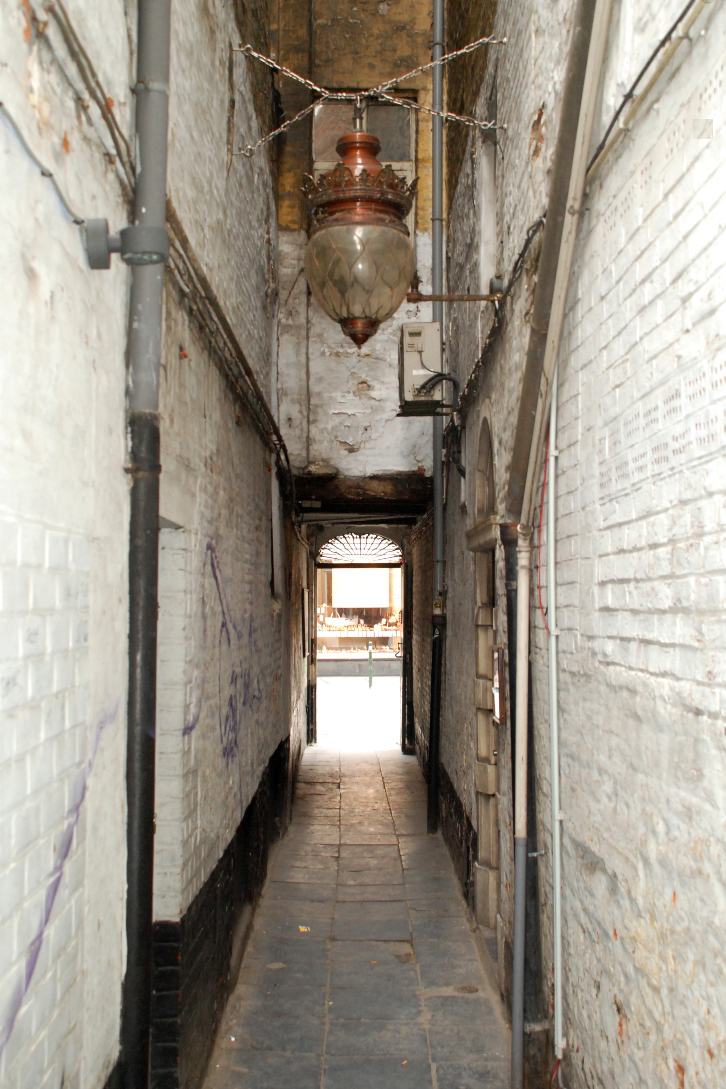 Belgique - Bruxelles - Impasse des Cadeaux